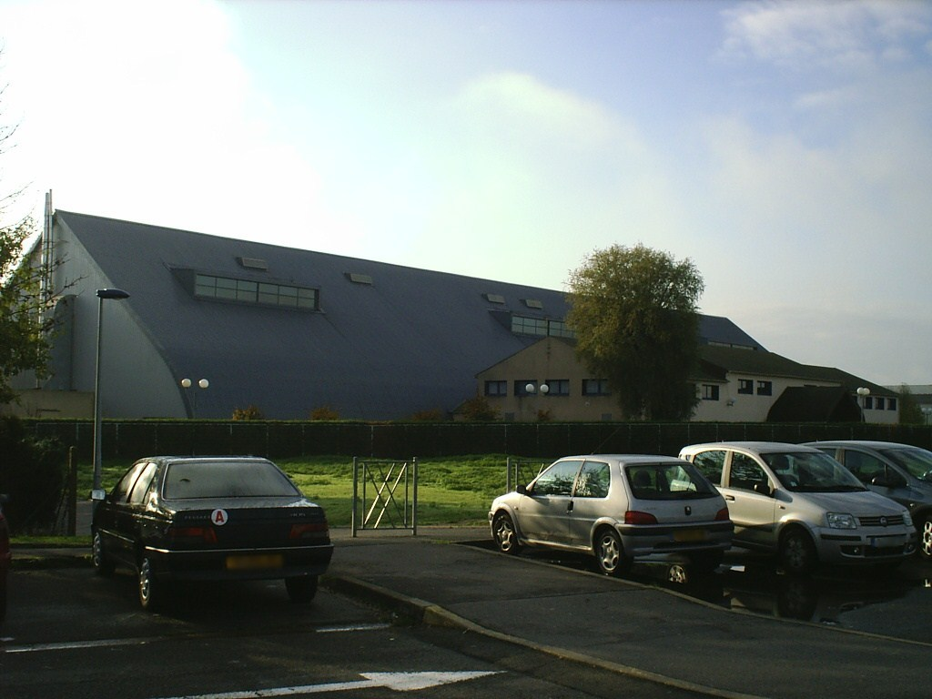 L'Espace Pierre-de Coubertin, un gymnase de Goussainville. Ancien bâtiment de stockage de sucre de l'ancienne sucrerie de Goussainville, don il s'agit du dernier vestige, construit vers 1950